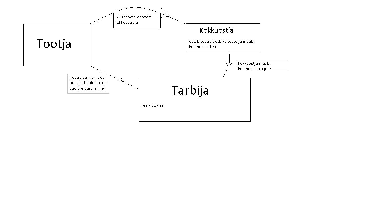 Vastutustundlikku tarbimist kujutav joonis.